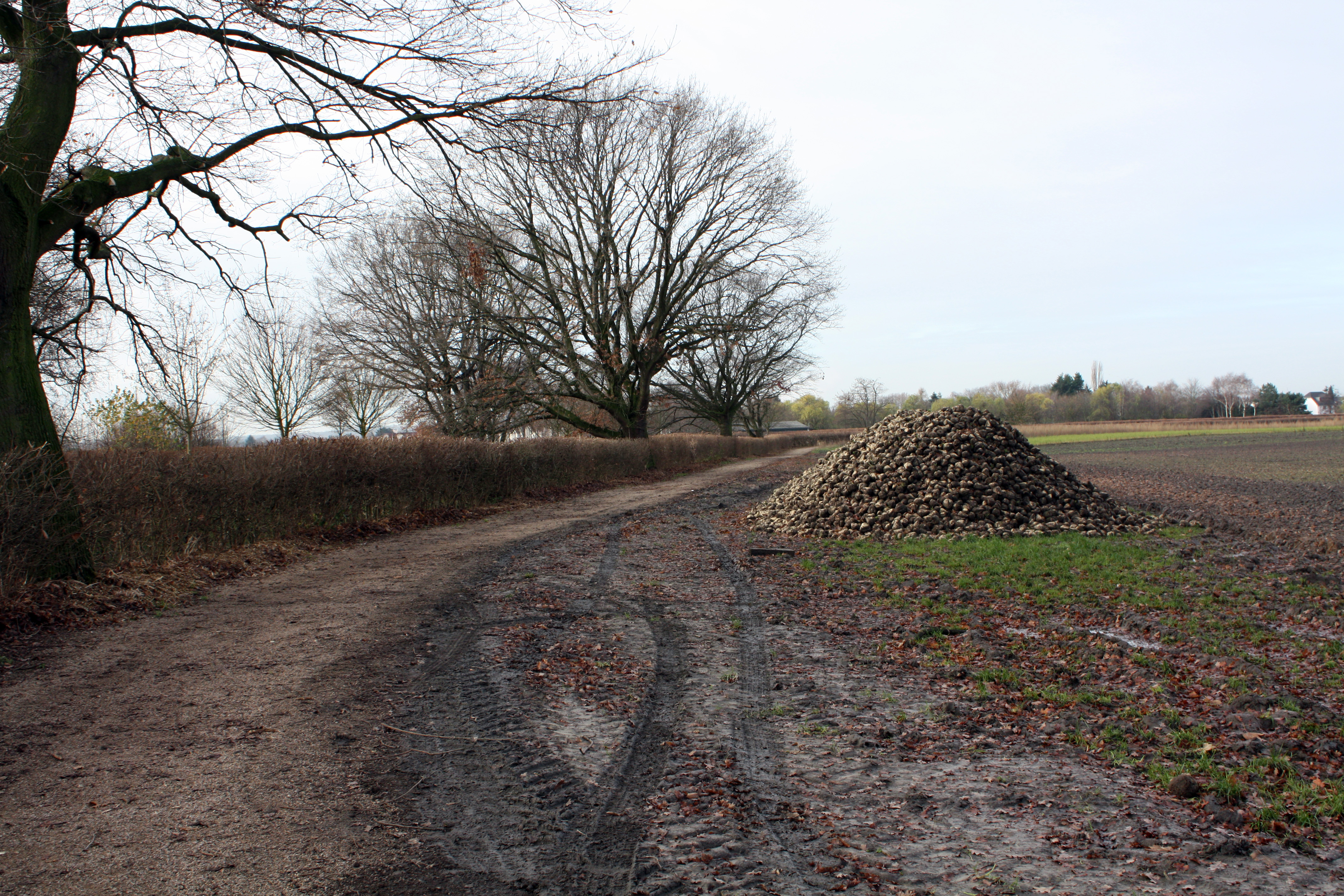 Hürth-Stotzheim, Rübenmiete